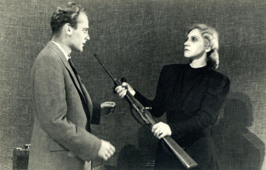 Karel Čapek, Mati, Drama SNG v Ljubljani. Na fotografiji: Mira Danilova (Mati), Branko Miklavc (Toni).